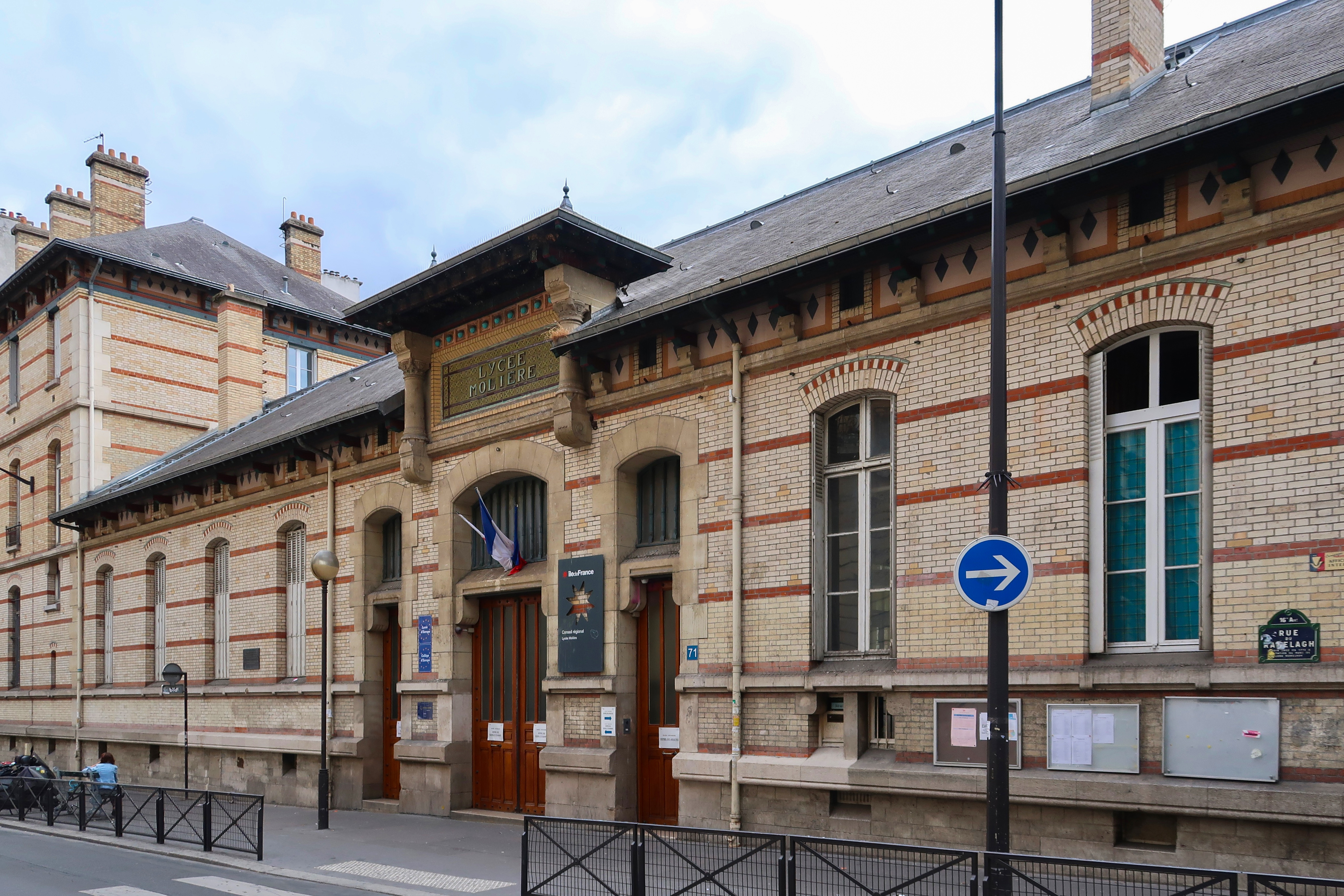 Lycée Molière, 71 rue du Ranelagh (Paris, 16e).